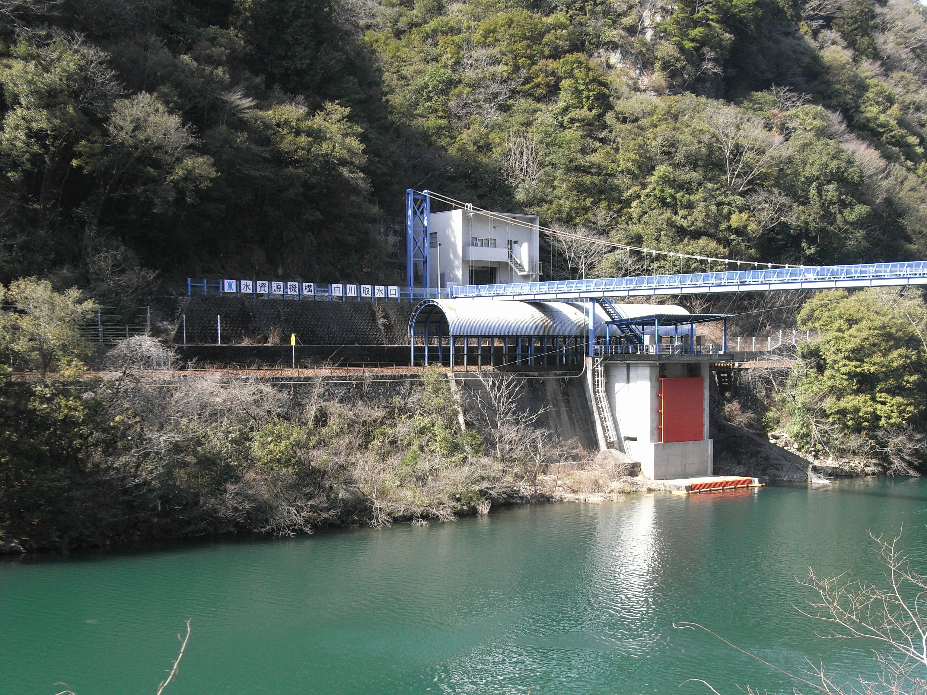 Dam